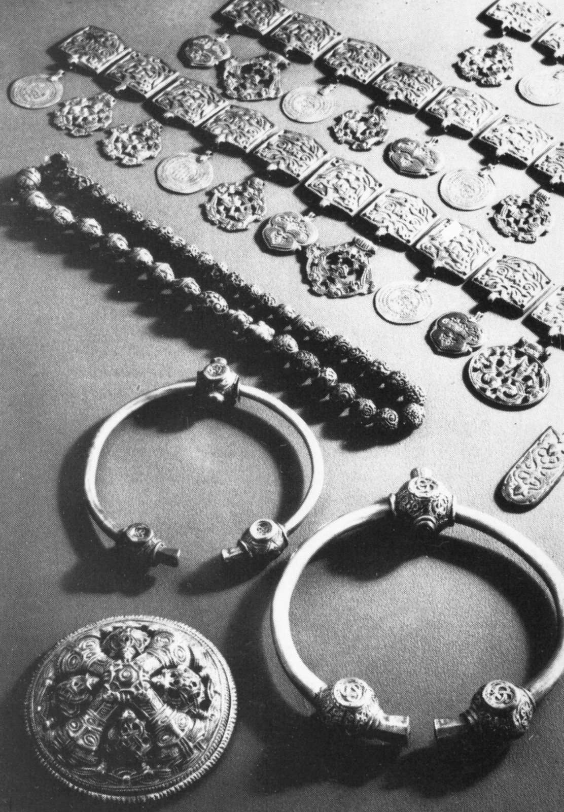 Några delar från Vårbyskatten